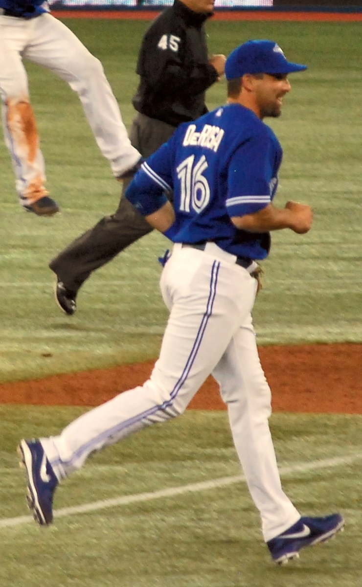 Mark DeRosa